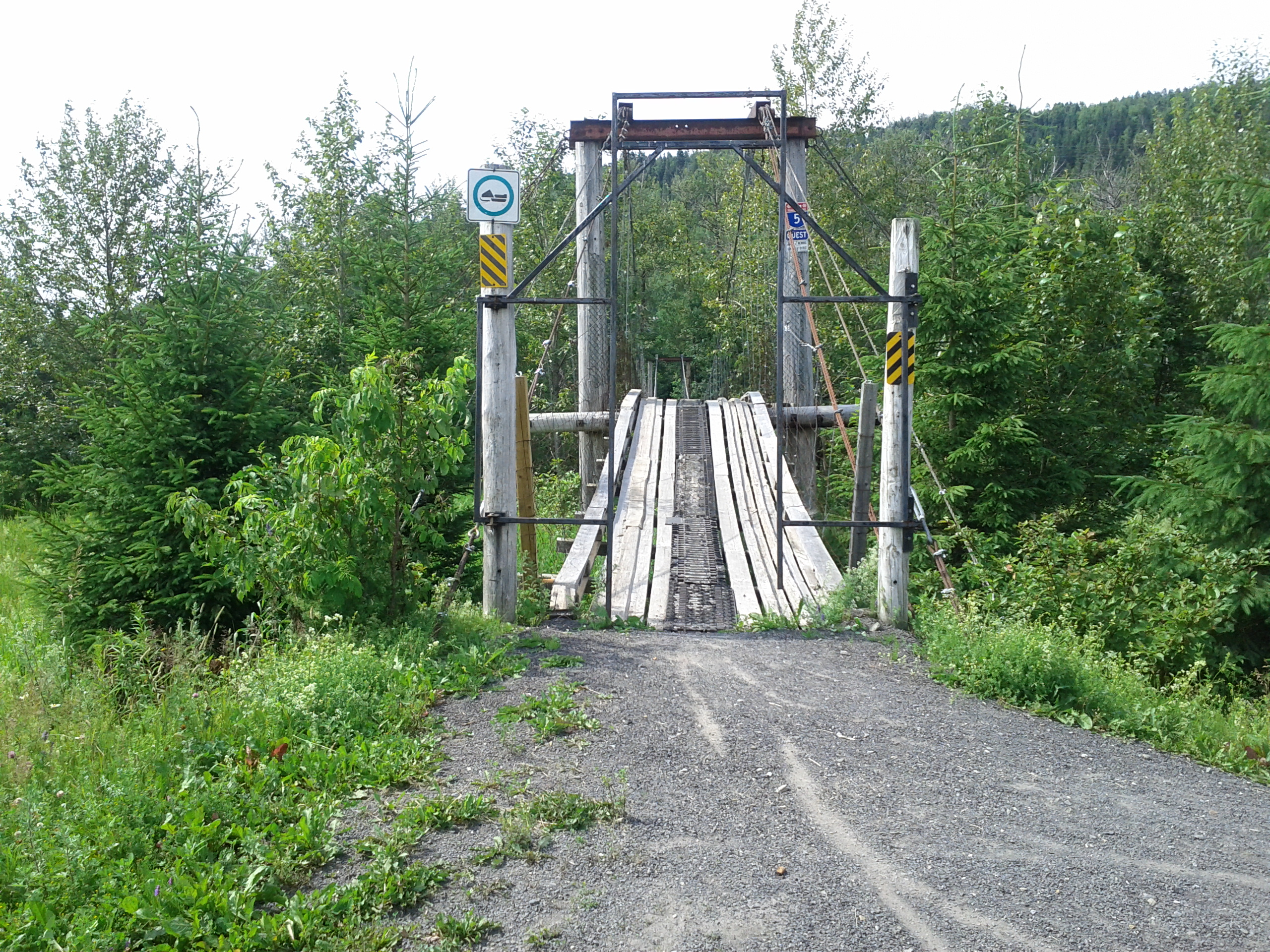 petit pont, Nouvelle